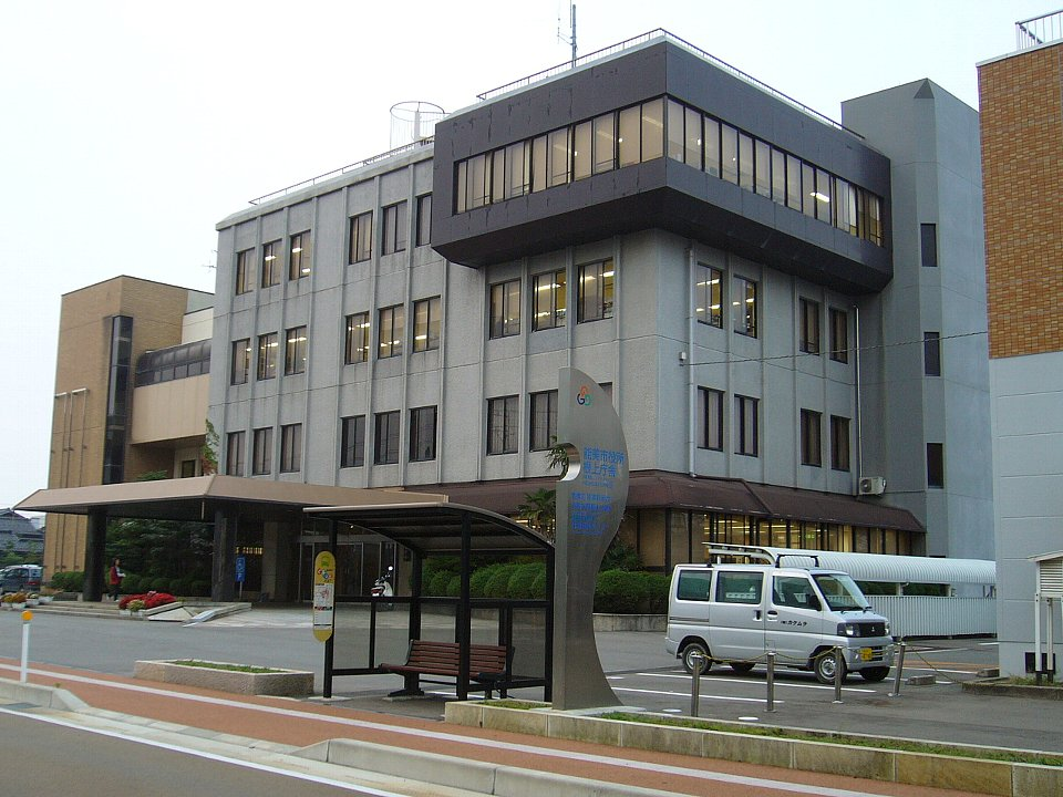 能美市役所根上庁舎 2006年10月12日 Bakkai撮影 Category:石川県の官公庁画像